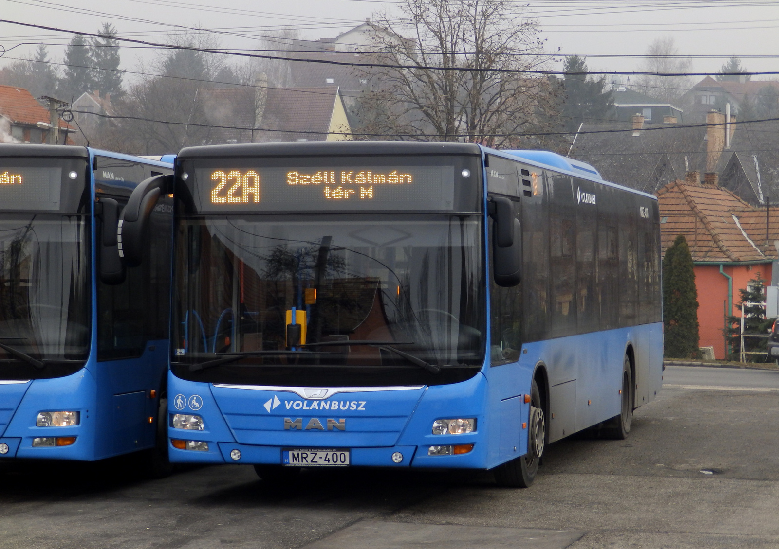 MAN A21 Lion’s City típusú autóbusz Budakeszin